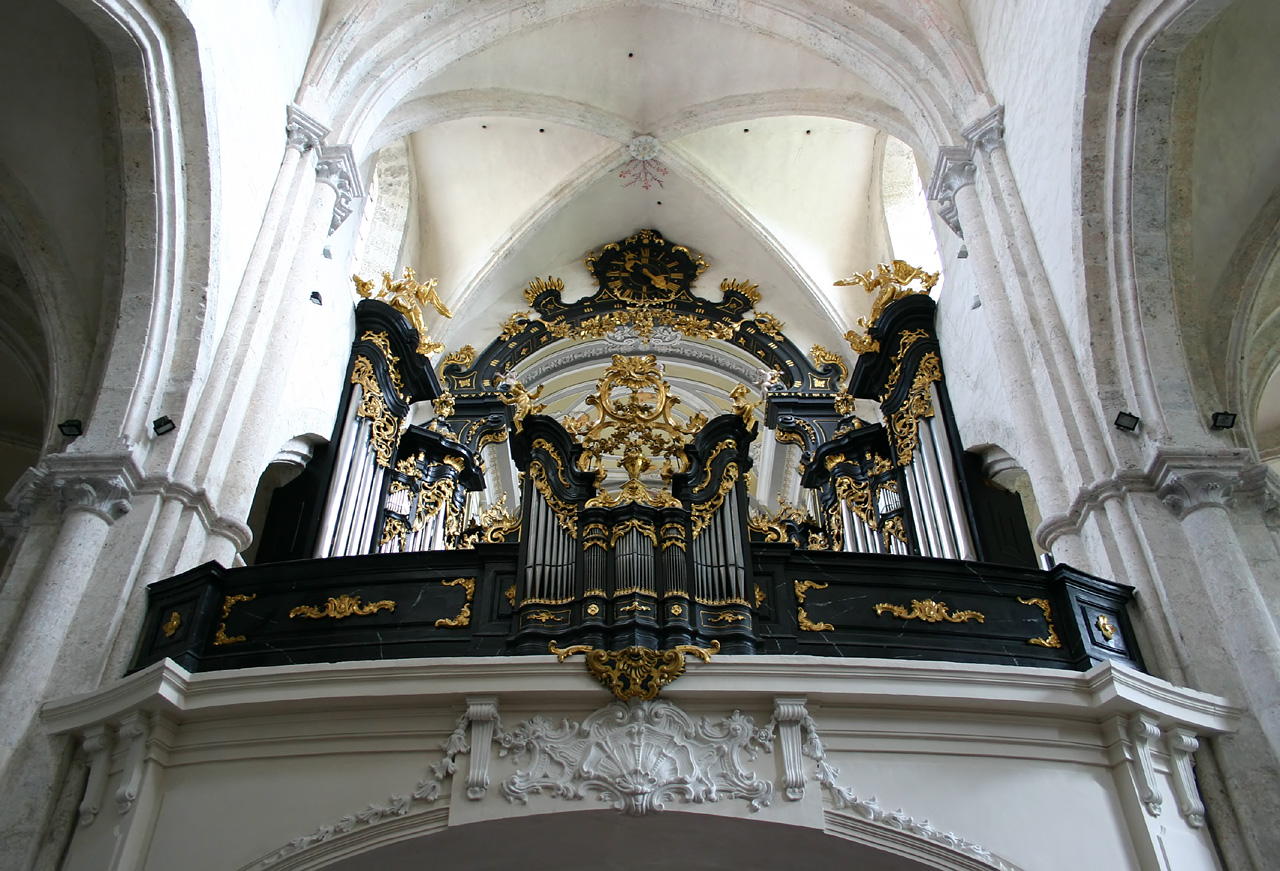 Orgelempore der Stiftskirche Lilienfeld, Niederösterreich